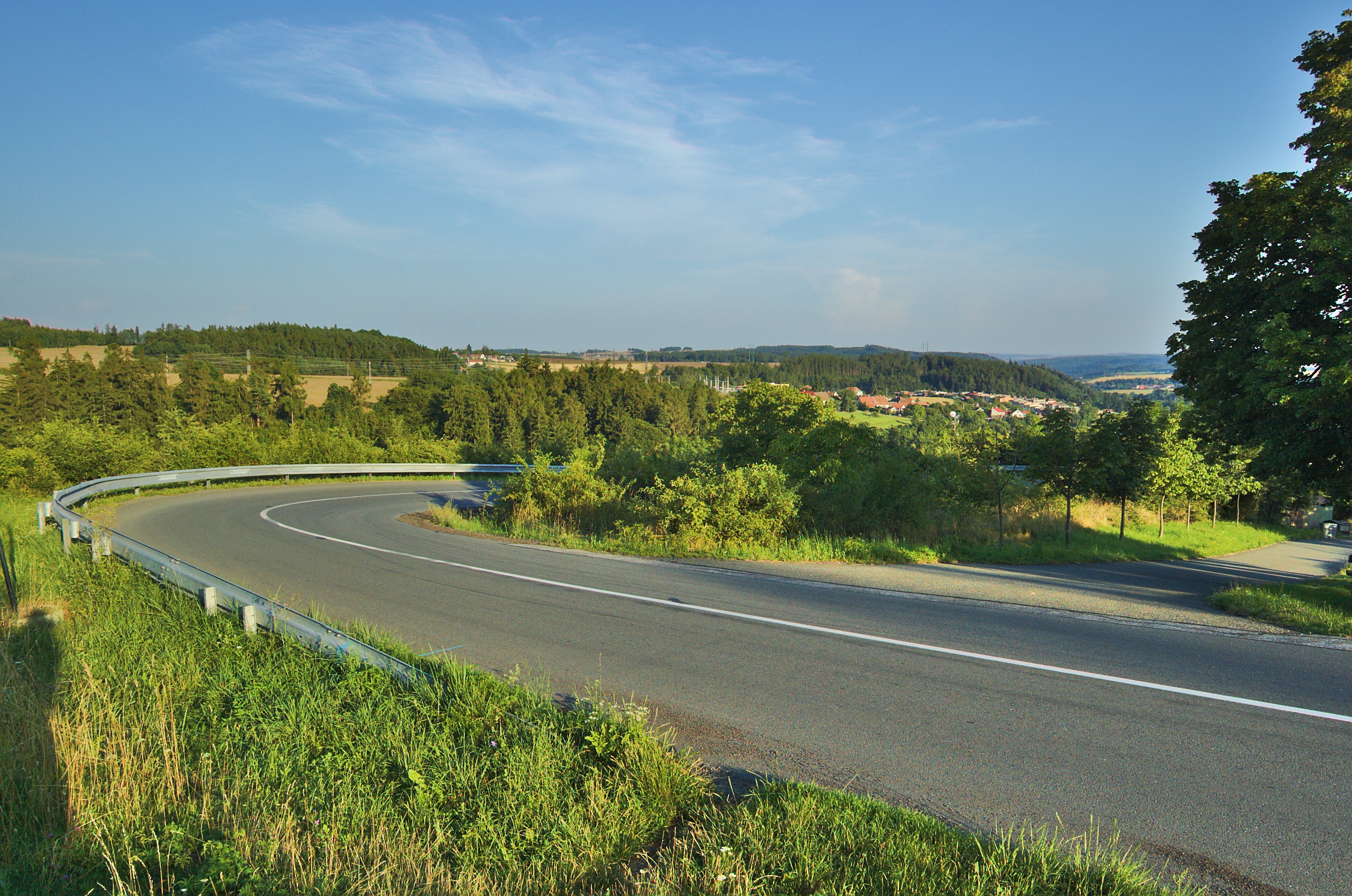 Pohled na Vyšehrad a Cihelnu, Konice, okres Prostějov